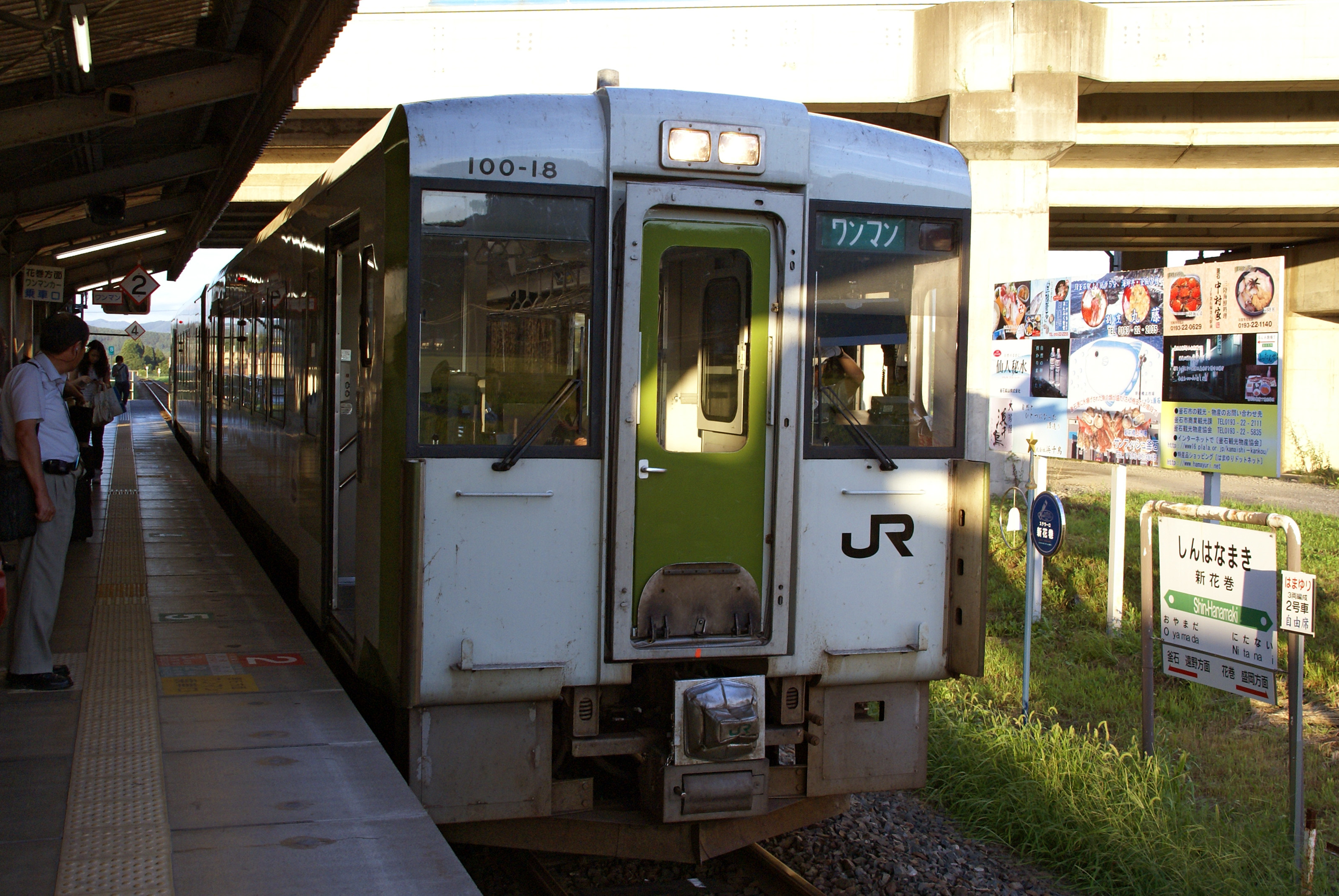 Shin-Hanamaki Station in Hanamaki, Iwate prefecture, Japan